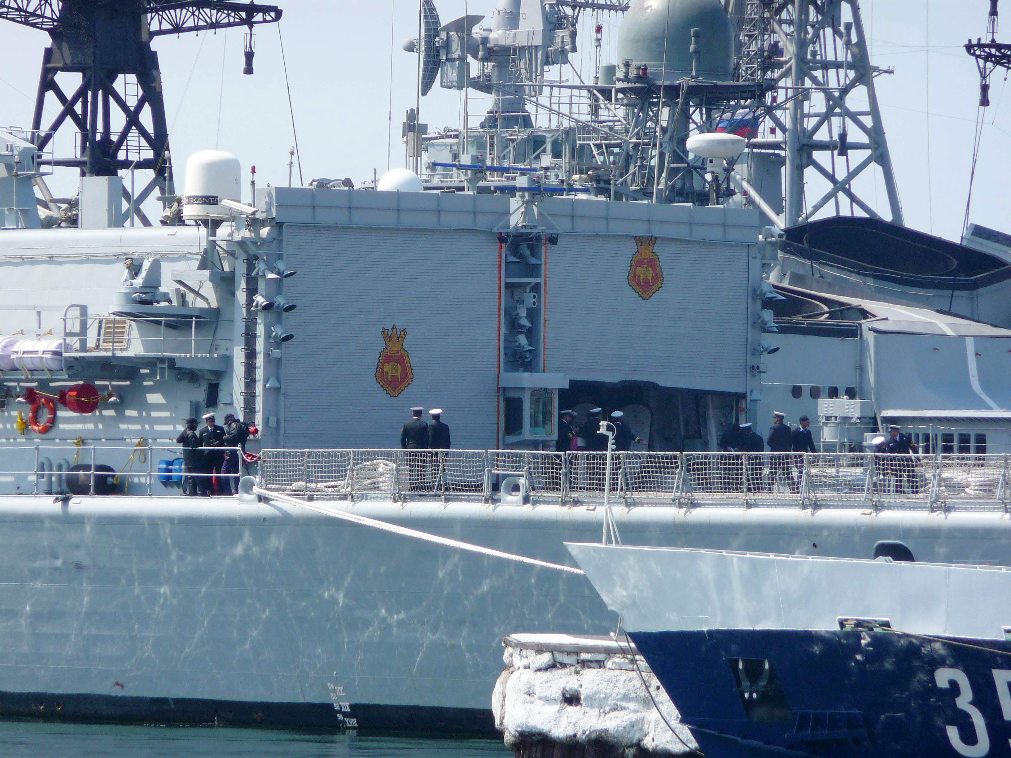 Ангар на эсминце D61 «Дели» ВМФ Индии. Снято во время визита индийских кораблей во Владивосток 19.04.2011 г.